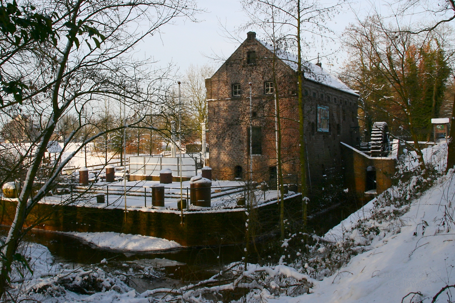 Arcen: Wijmarse Molen in de sneeuw